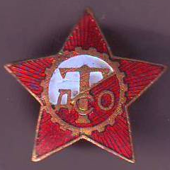 ДСО Торпедо (Плевен)